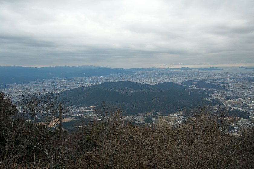 宝満山山頂から望む四王寺山。